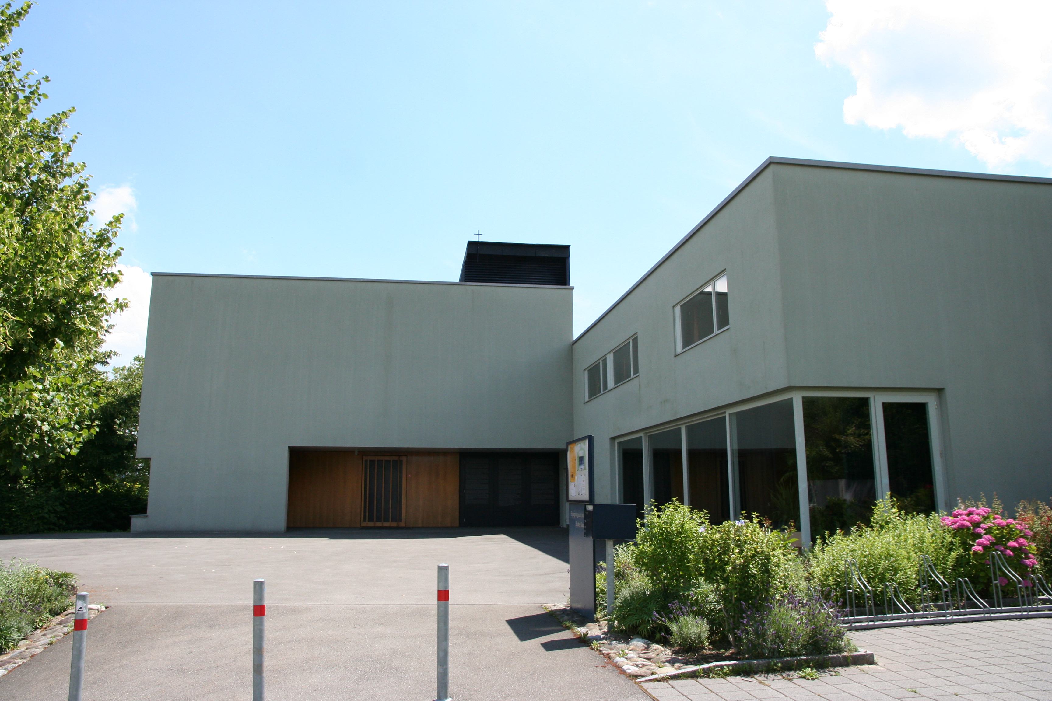 Römisch-katholische Kapelle Bruder Klaus in Wädenswil-Au, Aussenansicht